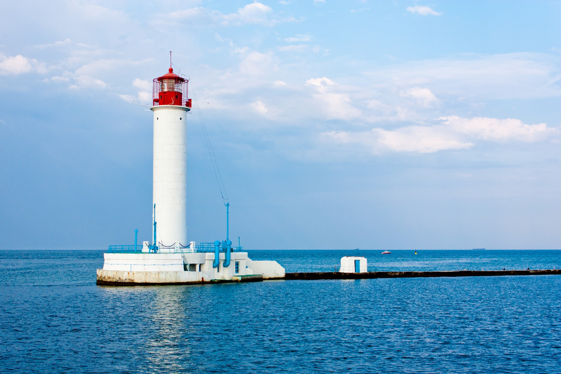 Воронцовський маяк, Одеса, Одеський морський торгівельний порт, Рейдовий мол